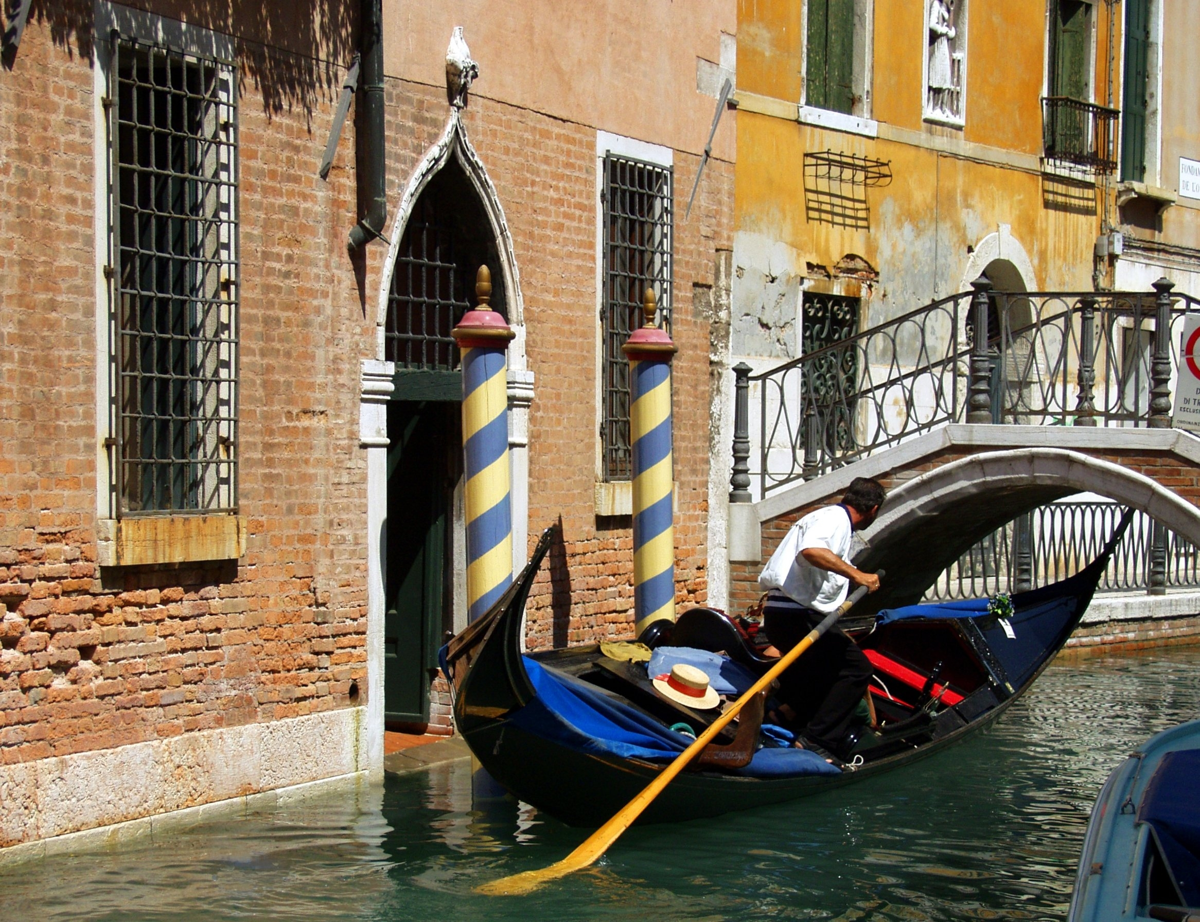 Gondola in Venice